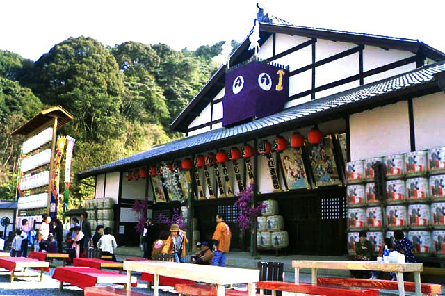 旧金比羅大芝居（歌舞伎の劇場） - 日本国香川県琴平町。